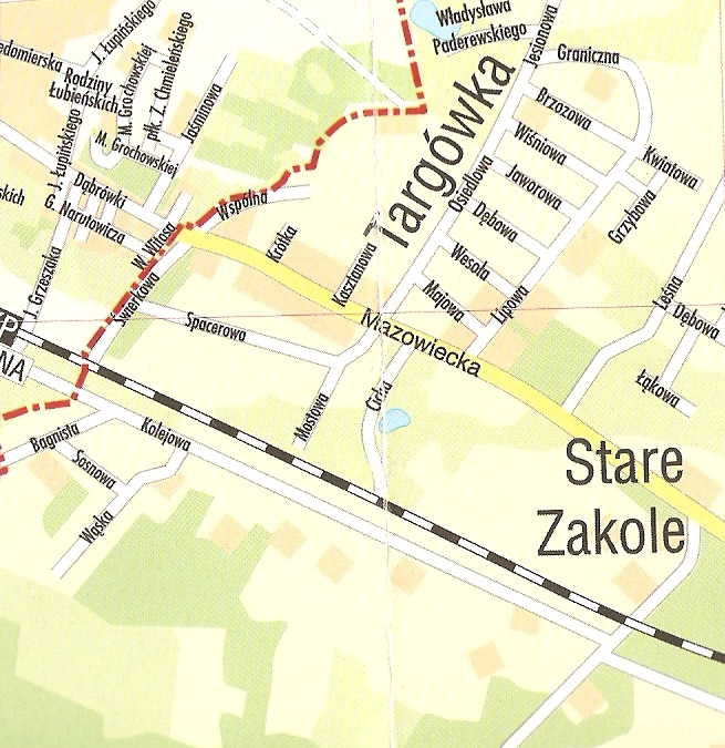 Mapa wsi Targówka